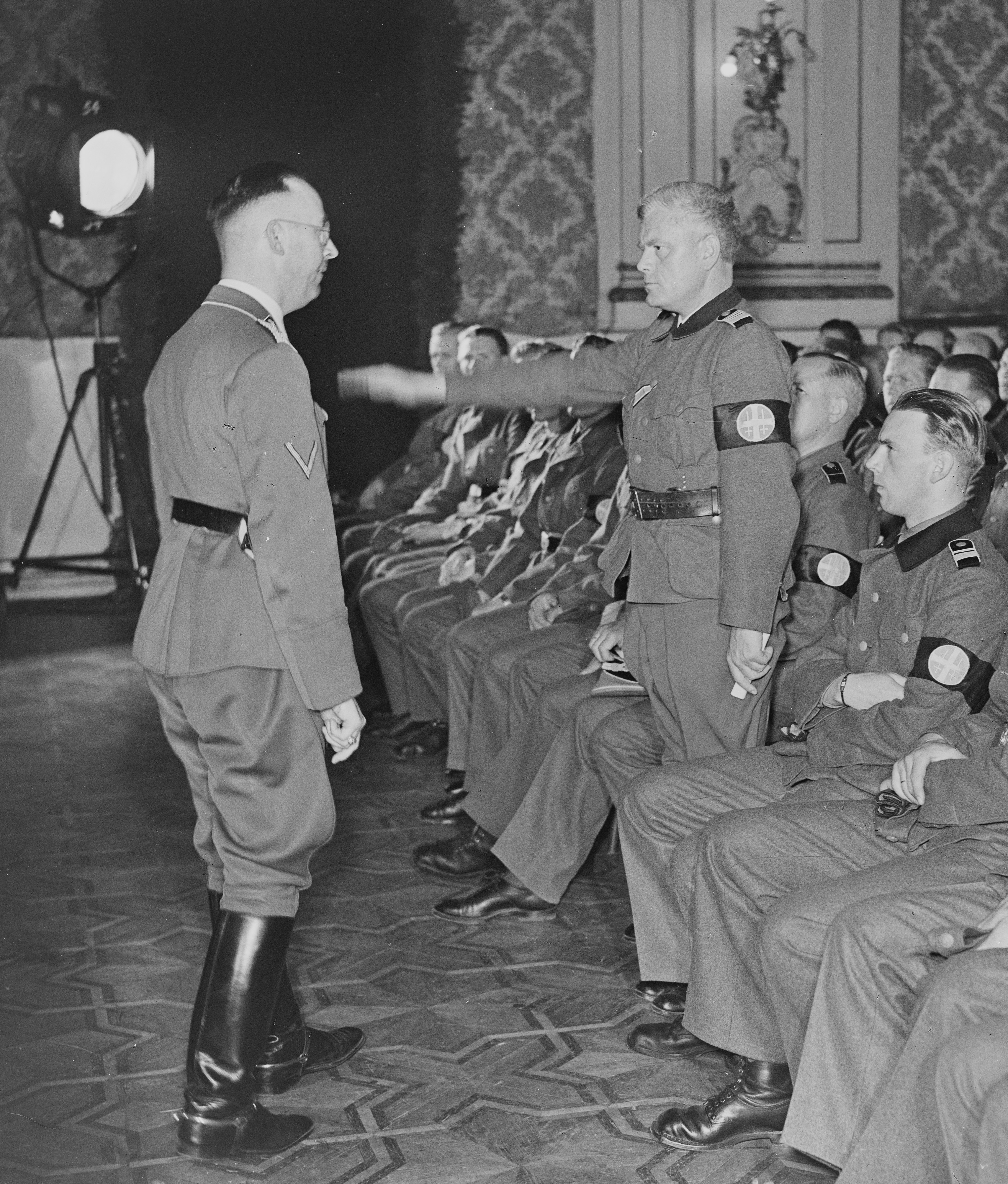 Norges SS. Edsavleggelsen